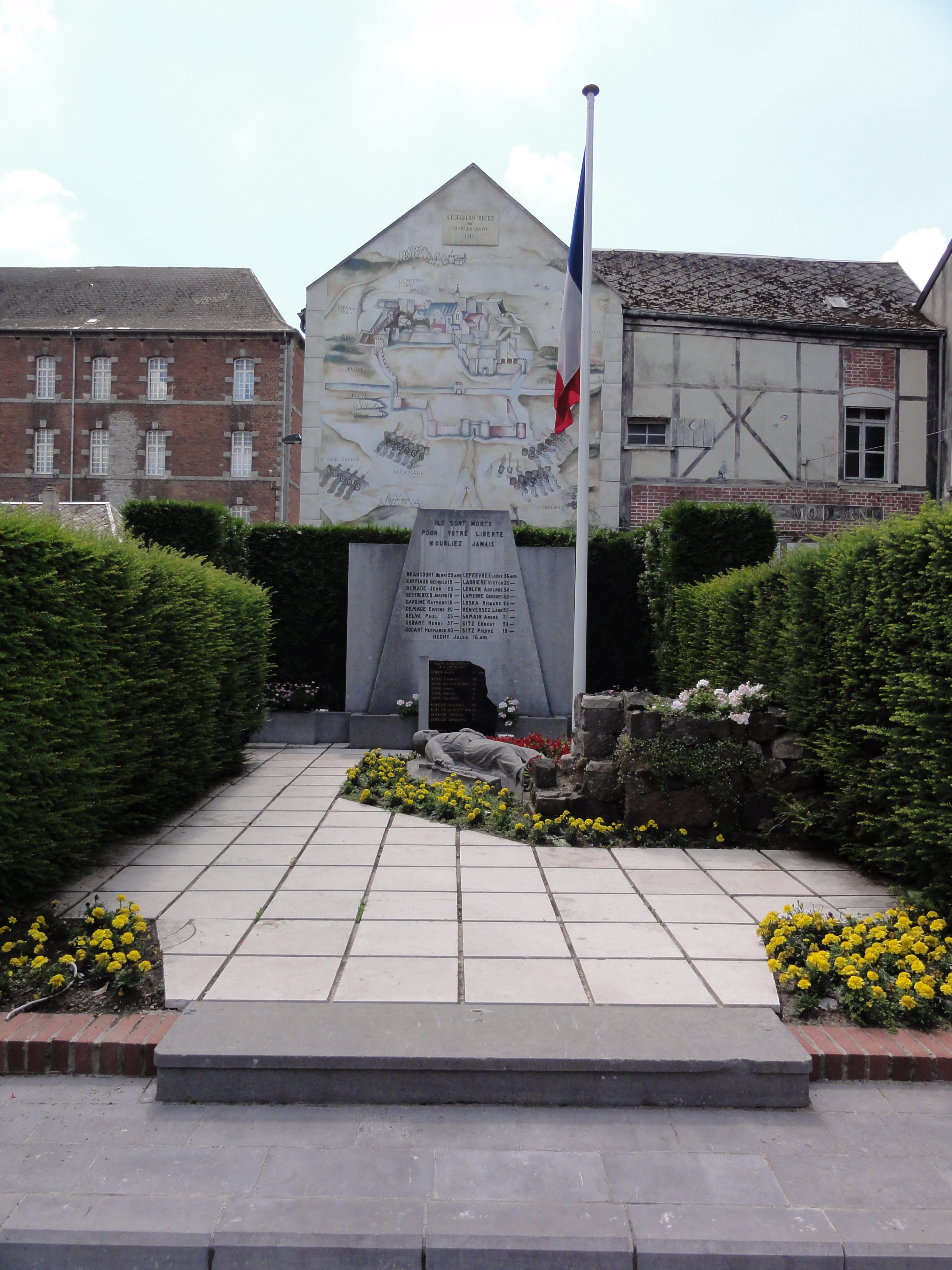 Landrecies (Nord, Fr) monument aux morts et memorial siège de Landrecies 1543